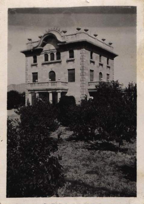 Una fotografía del hotel tomada en el verano de 1933